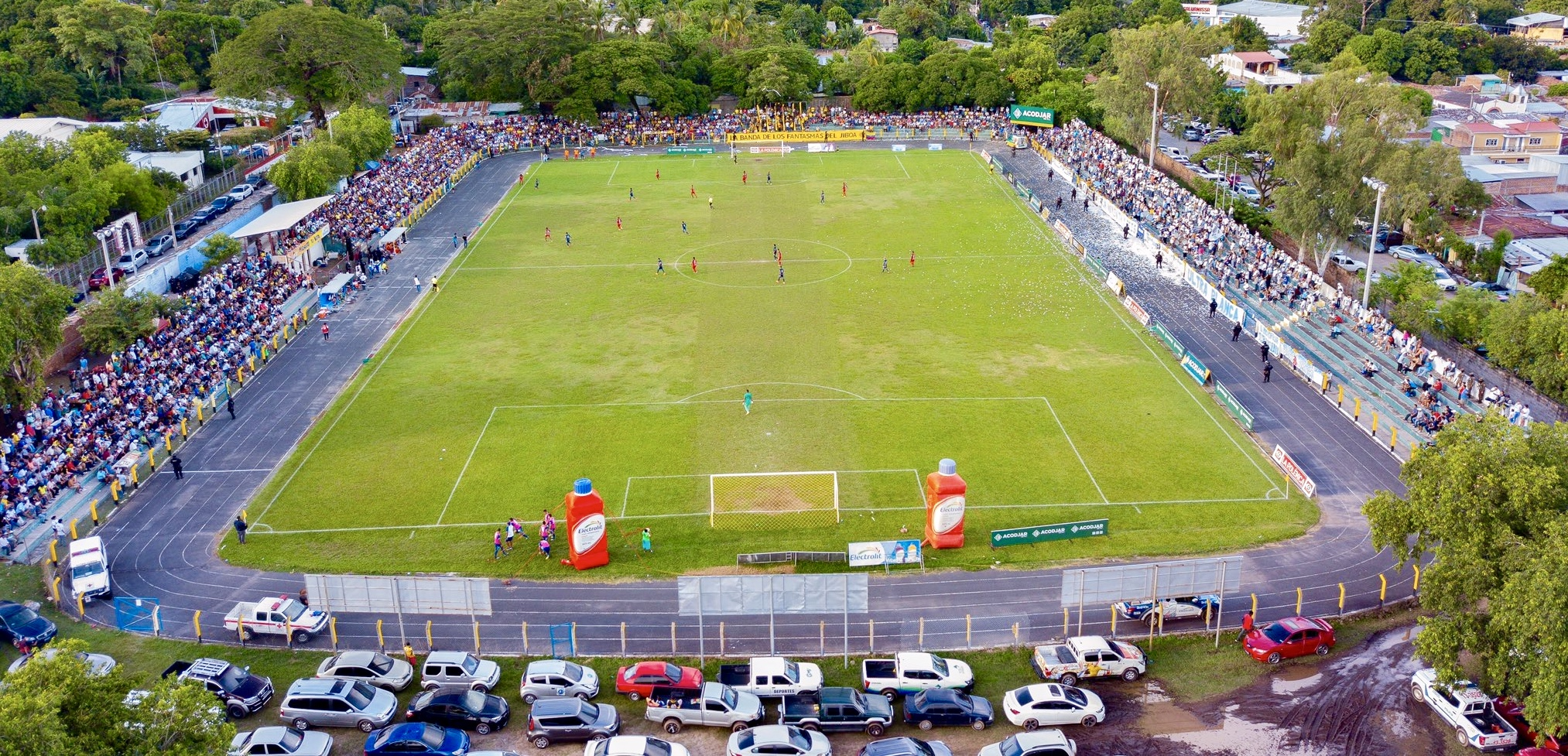 Estadio Sanvi panoramica